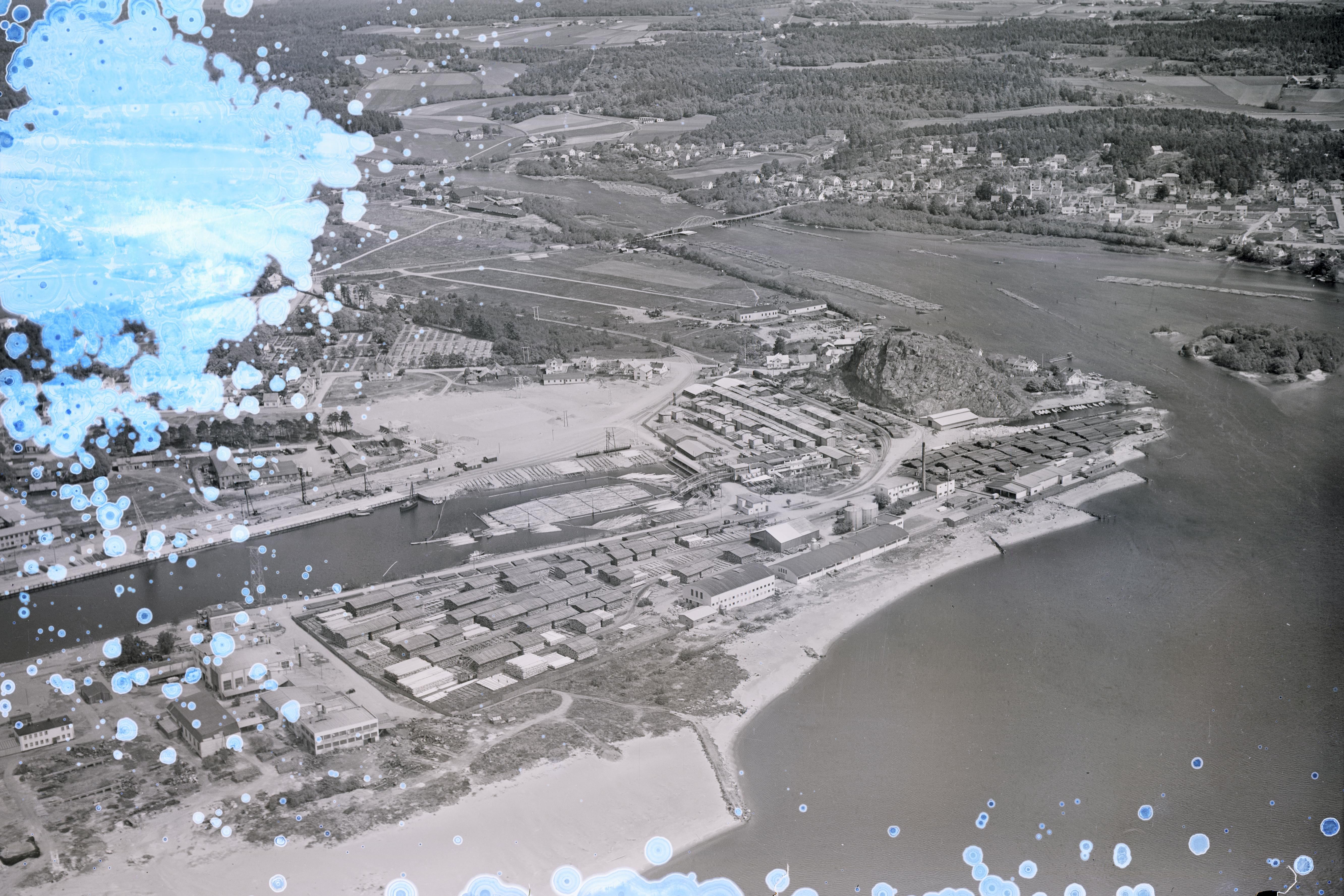 med Østre Halsen WF.HS.144481